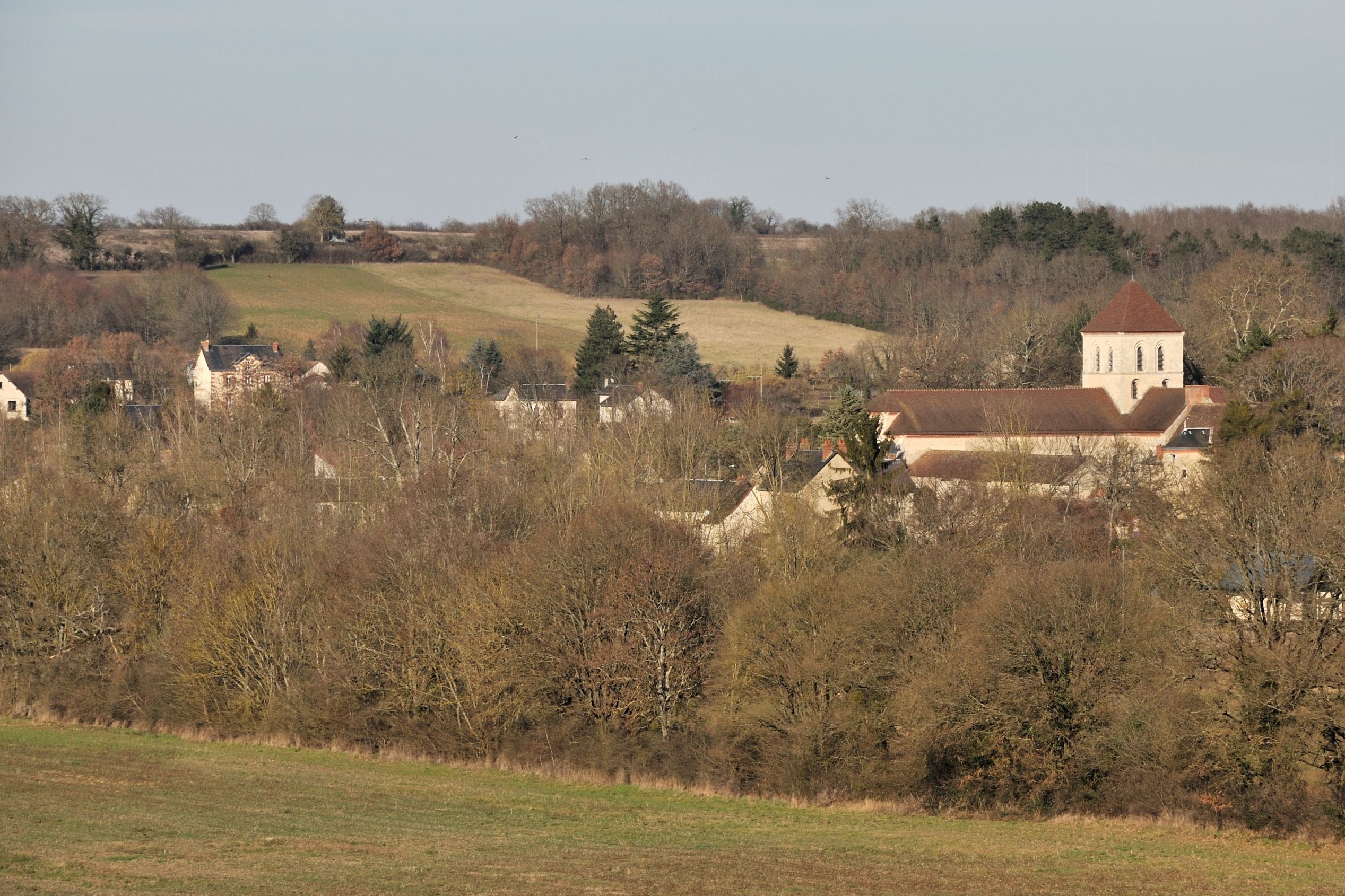 Ruffec (Indre) - Vue générale